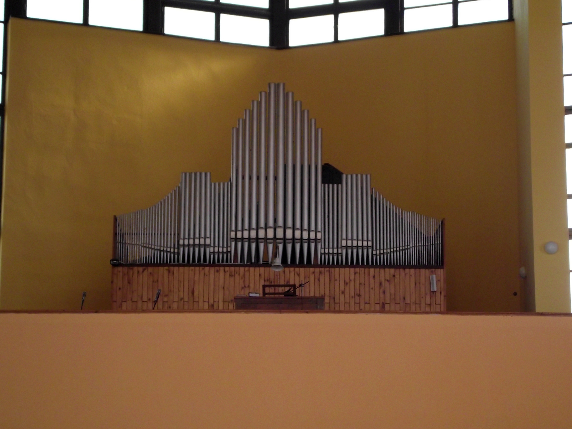 Organy w kościele parafialnym Przemienienia Pańskiego w Częstochowie